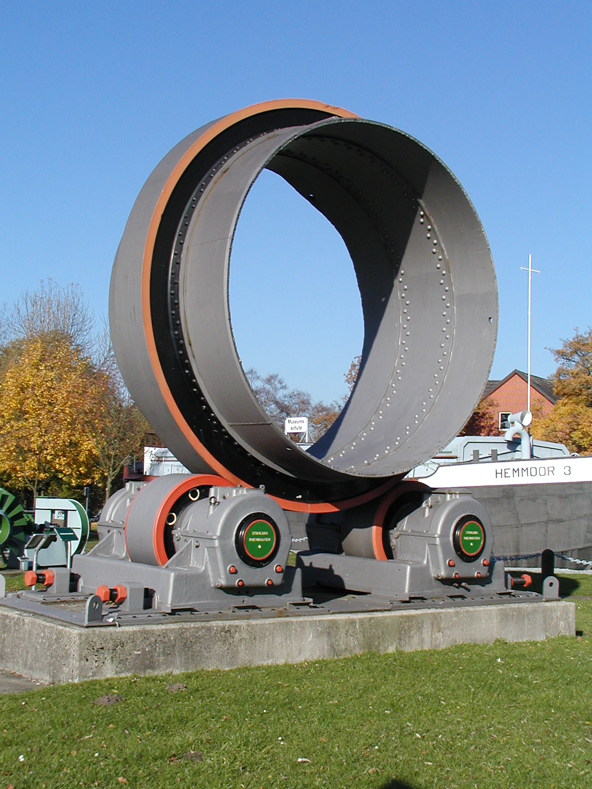 Kleiner Teil eines Drehrohrofens, sie waren bis 165m lang, Durchmesser bis 5m